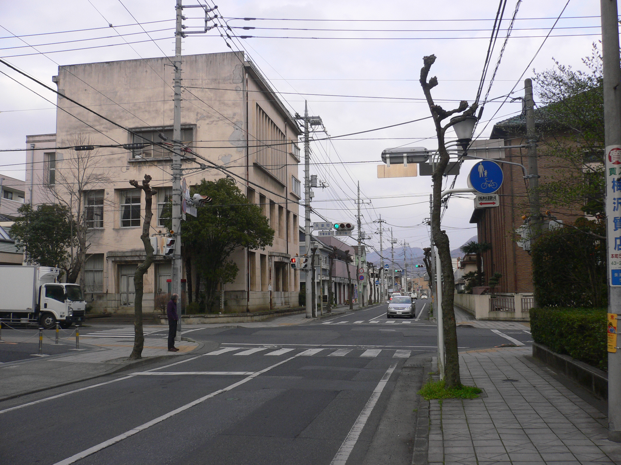 Kiryu